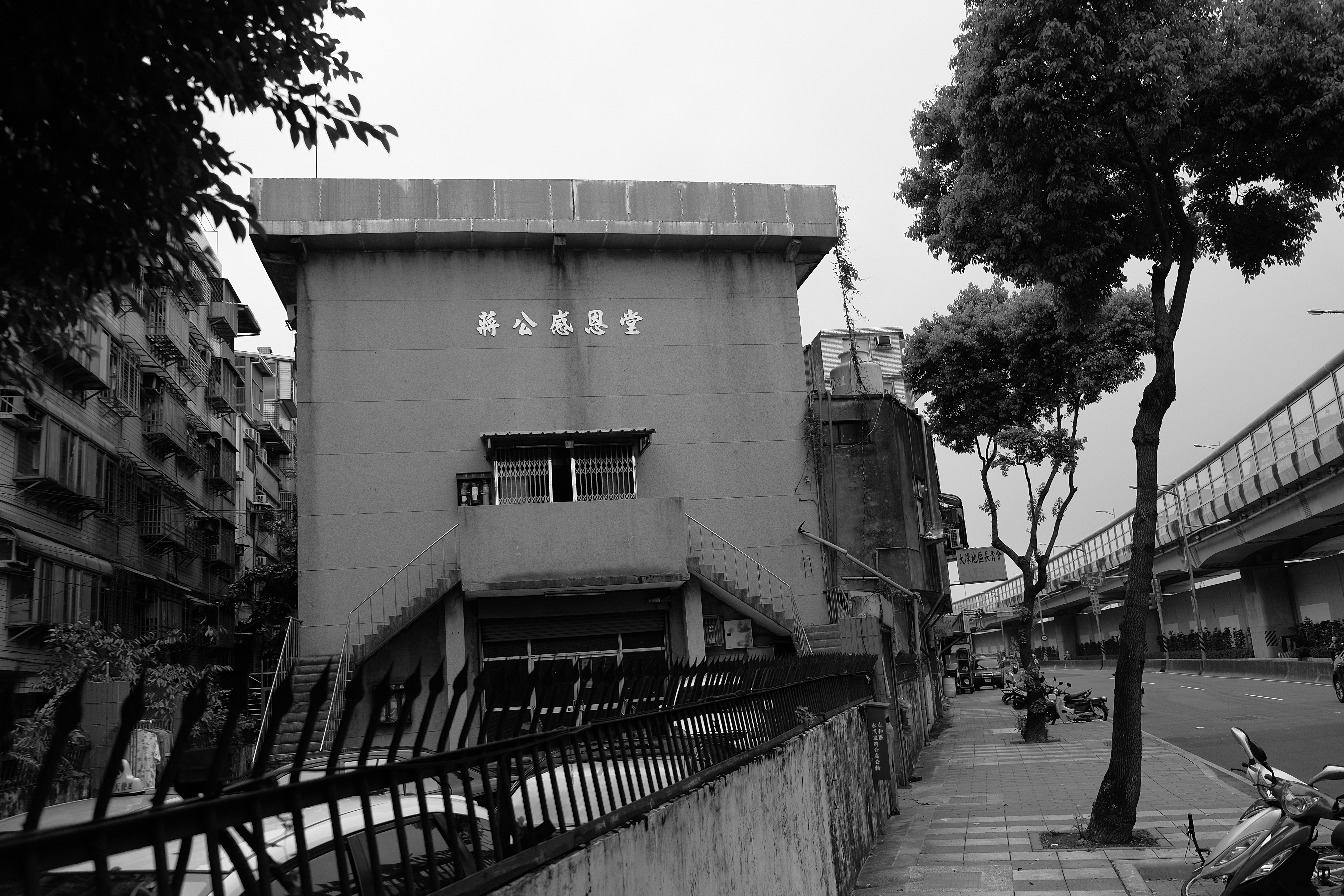 2016年永和大陳義胞社區